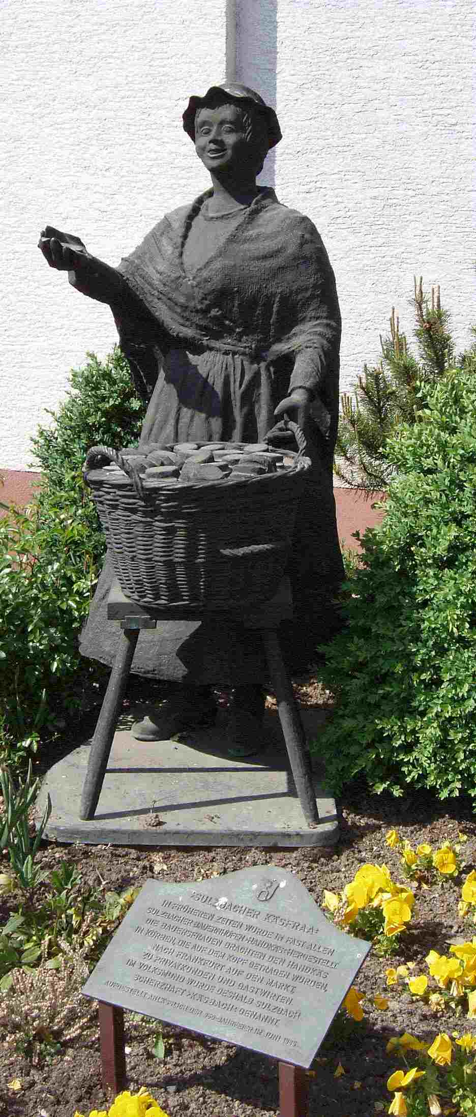 Statue: Sulzbacher Käsefrau in der Hauptstrasse in 65843 Sulzbach (Taunus) , Deutschland Inschrift auf dem Schild: Sulzbacher Käsfraa, In früheren Zeiten wurde in fast allen Sulzbacher Bauernhöfe Handkäs hergestellt , die Bauerfrauen brachten den Handkäs in Körben, die auf dem Kopf getragen wurden, nach Frankfurt auf den Markt, zu Privatkunden und Gastwirten. Im Volksmund wurde Sulzbach scherzhaft "Käsbach" genannt.